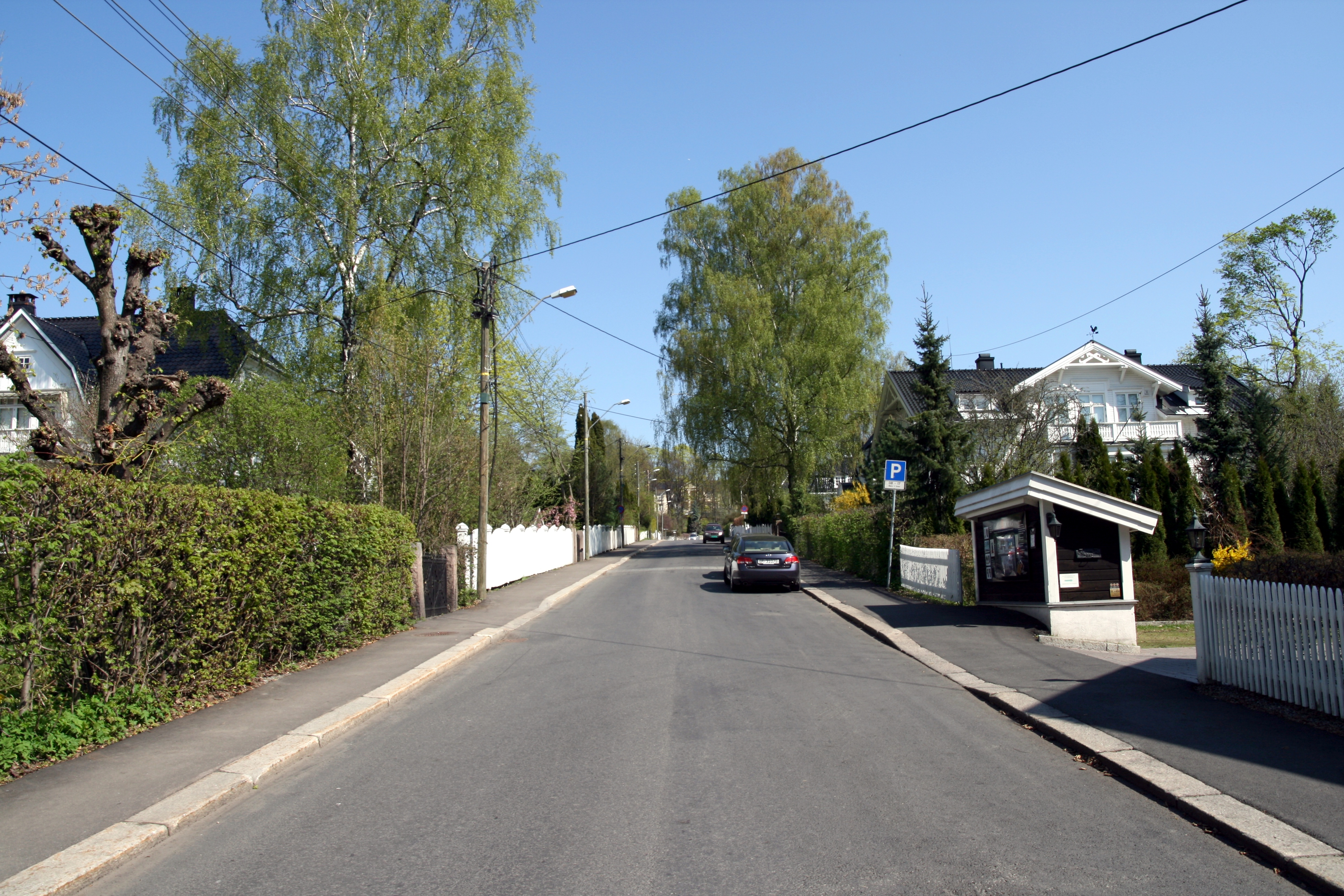 Madserud allé på Skøyen i Oslo, sett mot nordøst like ved innkjørselen fra Drammensveien.